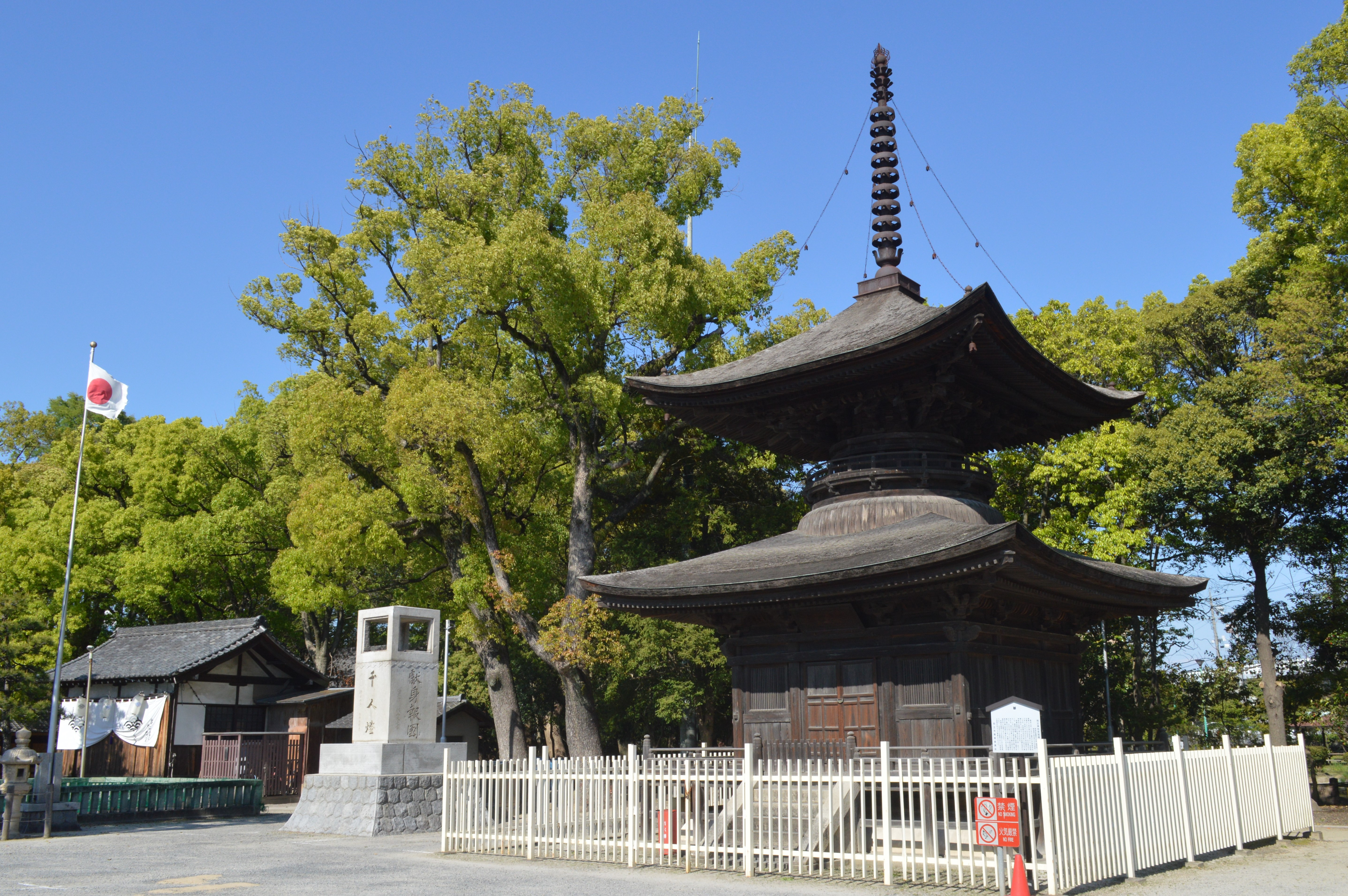 愛知県知立市にある知立神社。多宝塔。国の重要文化財。左は千人塔。